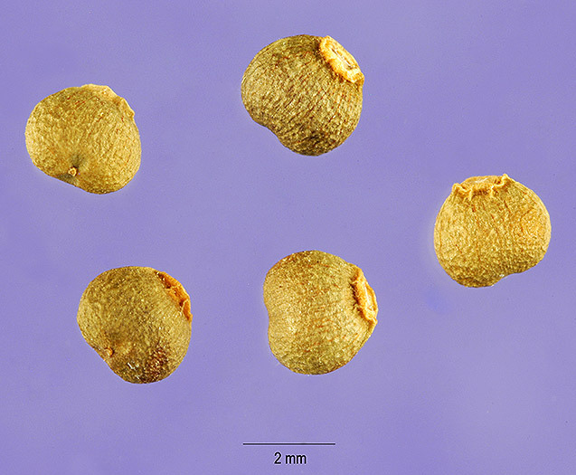 Fumaria officinalis L. , 1753 (Sangre de Cristo) : Frutos maduros (aquenios).